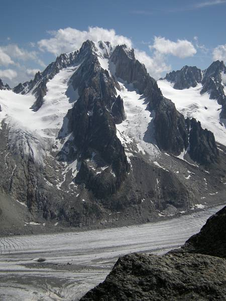 Aiguille d'Argentière depuis les Grands Montets, dominant le glacier d'Argentière